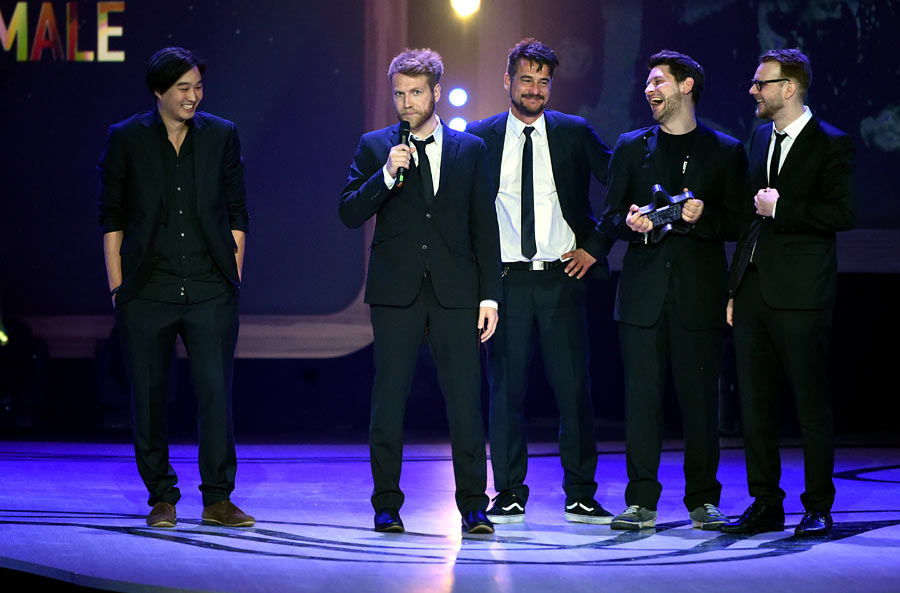 Rocketbeans TV (Daniel Budiman, Nils Bomhoff, Arno Heinisch, Simon Krätschmer, Etienne Gardé) bei der Verleihung des Webvideopreises 2015